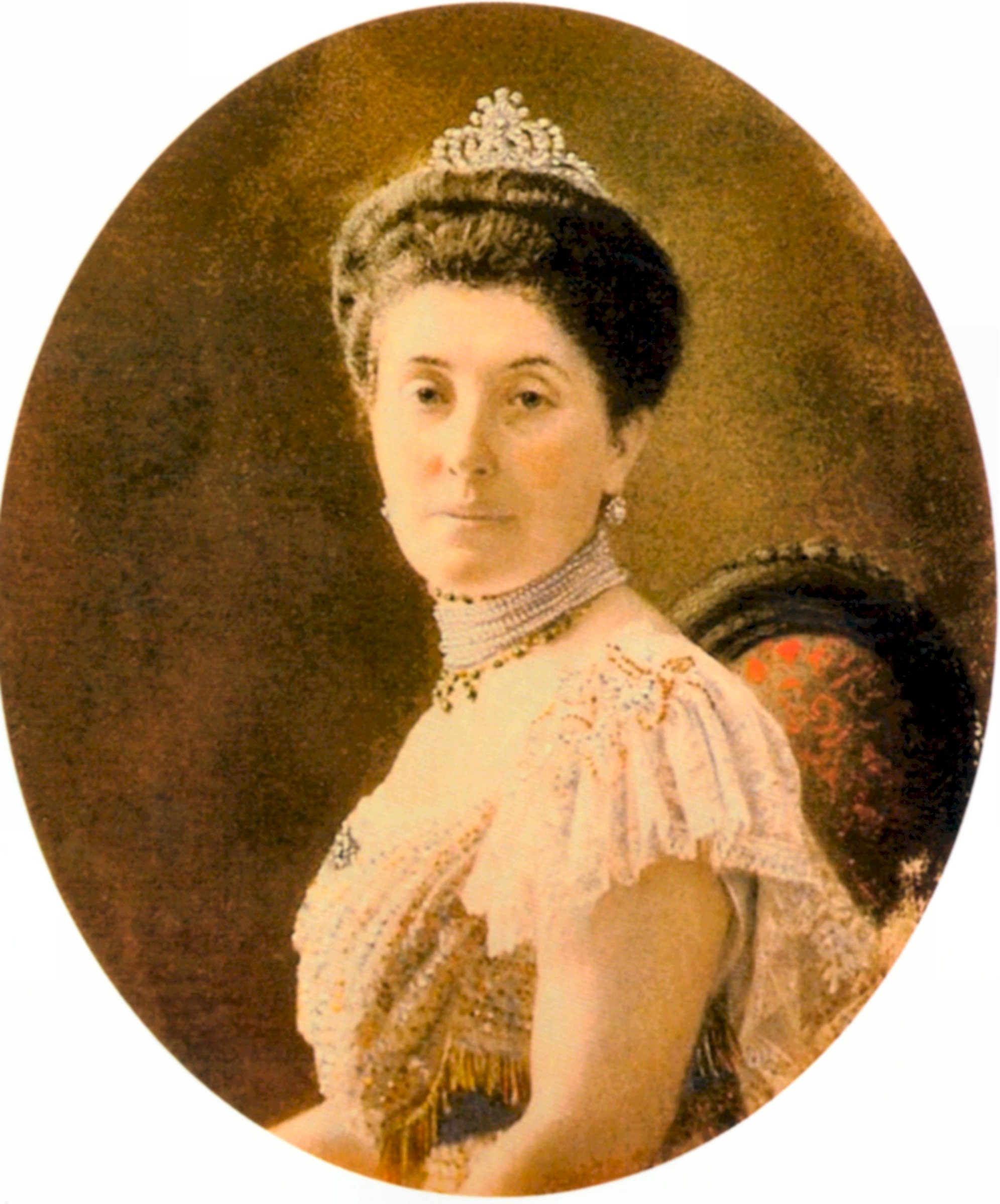 Helene von Flondor, nach 1900, Gattin des Grafen Anatol von Bigot de Saint-Quentin